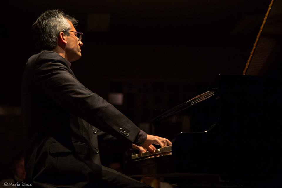 Javier Herguera